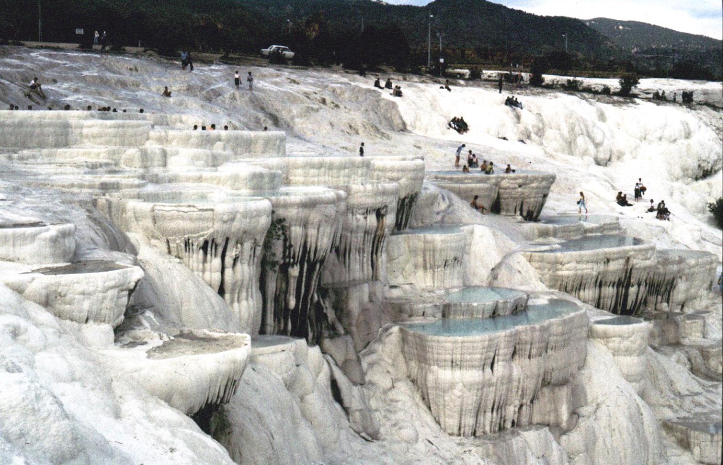 Description: Kalksinterterrassen von Pamukkale im Frühjahr 1987 Source: Selbst fotografiert Date: April 1987 Author: Schubbay